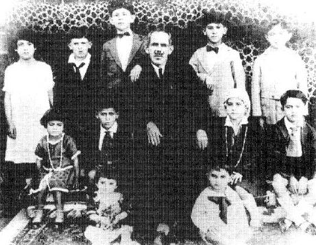 يوسف الزين (1882- 1963) سياسي لبناني من جبل عامل، والد النائب عبد اللطيف الزين والنائب عبد المجيد الزين